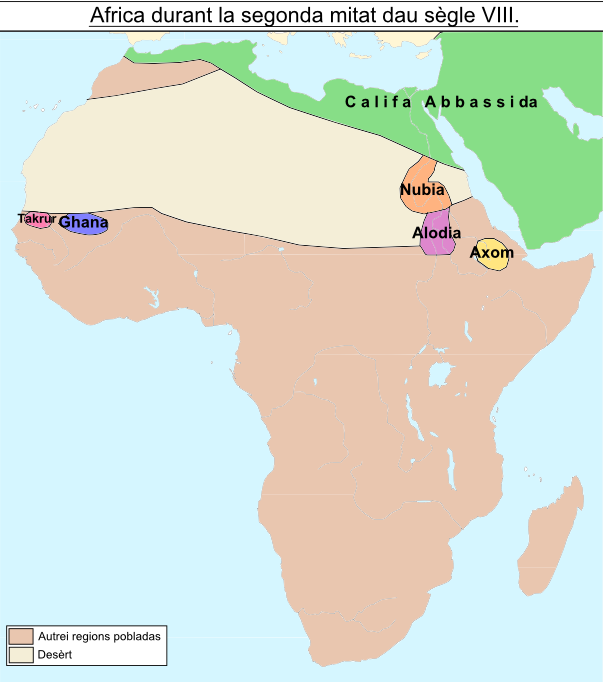 Africa durant la segonda mitat dau sègle VIII.